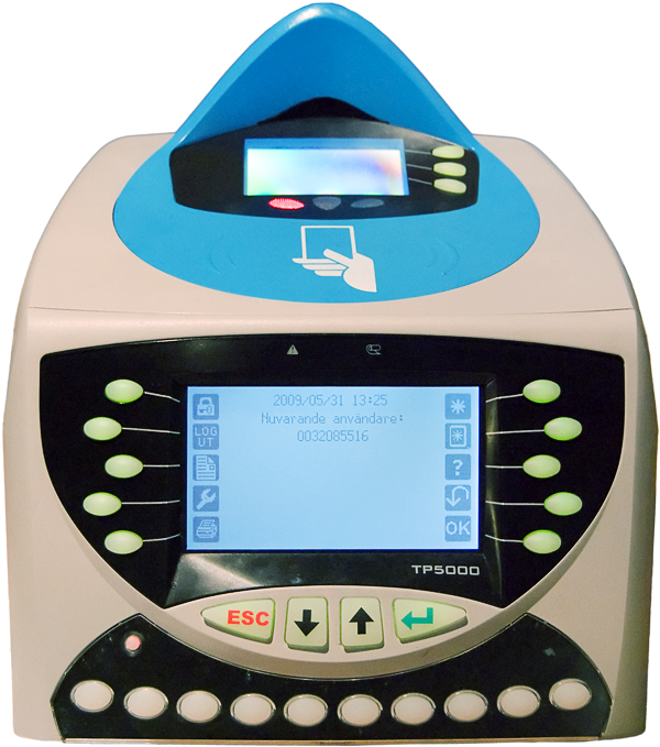 SL Access-terminal.